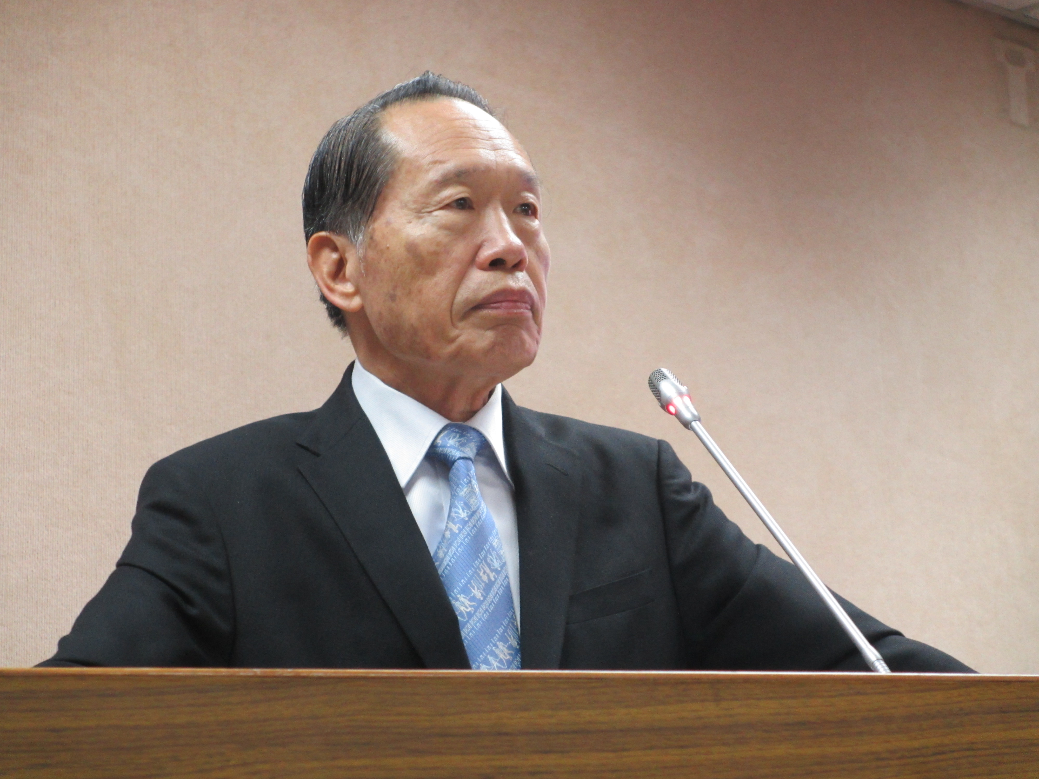 中文（台灣）: 台灣執政黨國民黨立委陳鎮湘(美國之音張永泰拍攝)